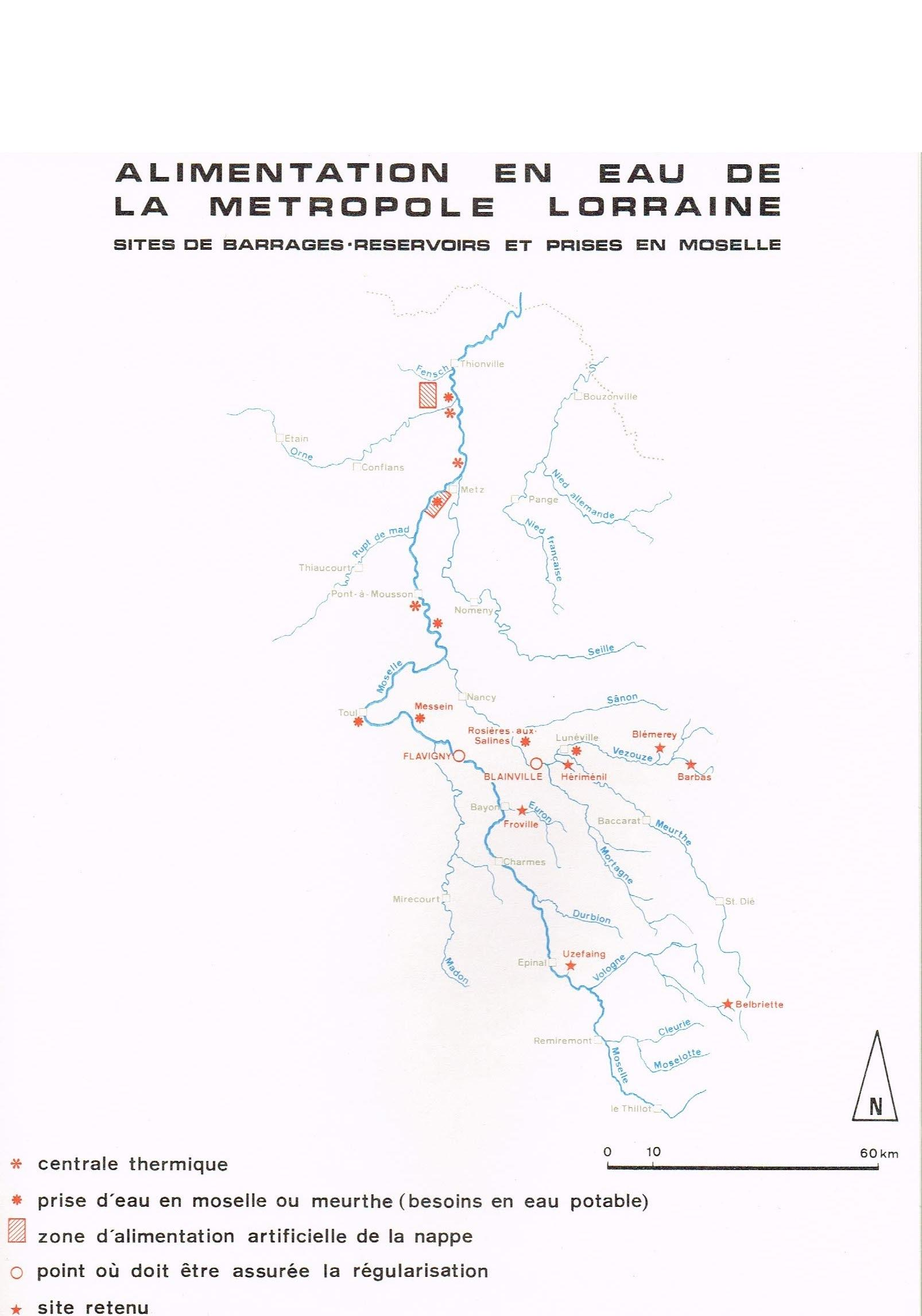 Lorraine, Alimentation en eau de la métropole lorraine : Sites de barrages - réservoirs et prises en Moselle, étude p 166